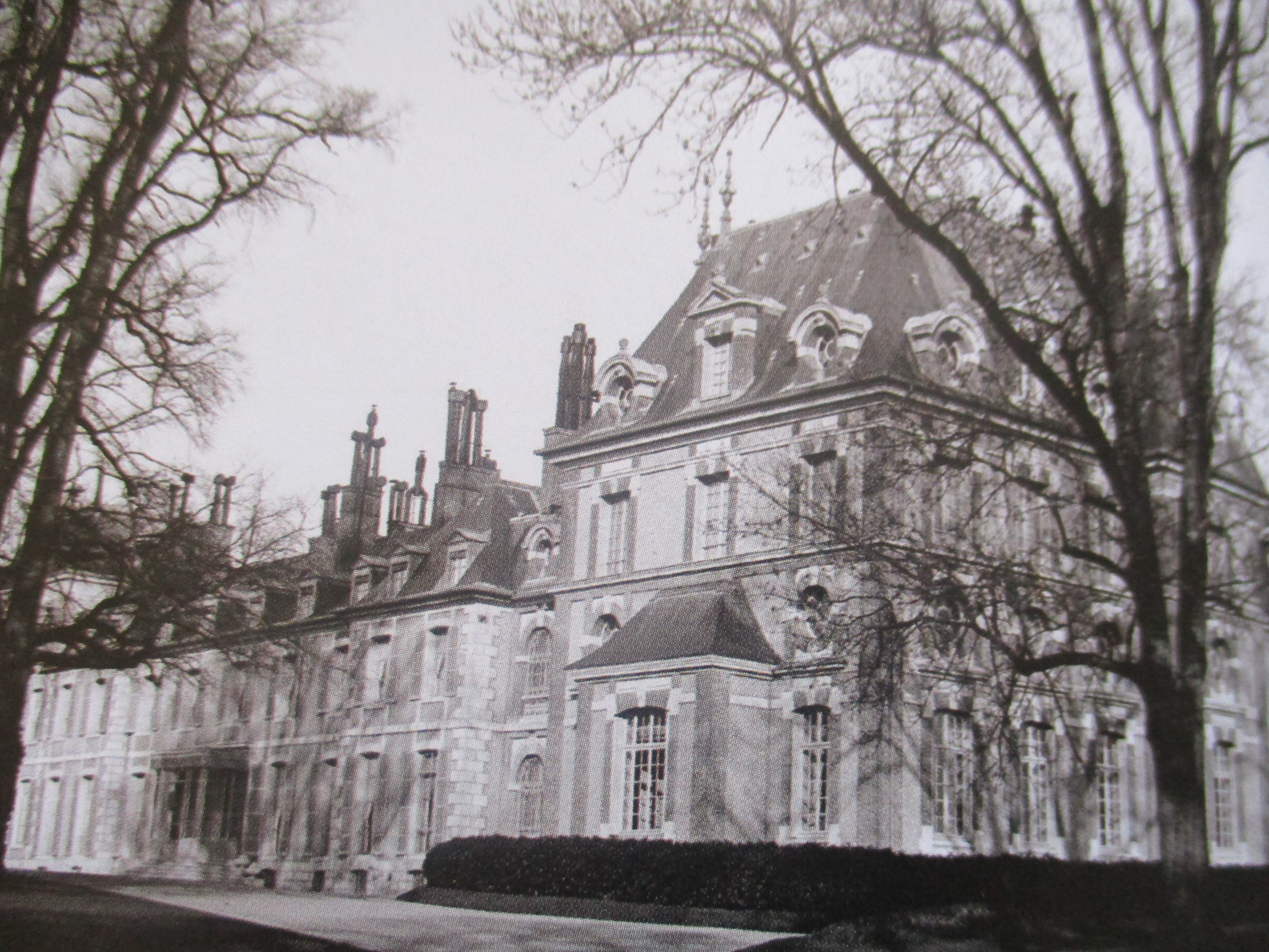 Le château de Bois-Boudran au début du XXe siècle, près de Fontenailles. Il appartenait alors au comte et à la comtesse Greffulhe, immortalisés par Proust.